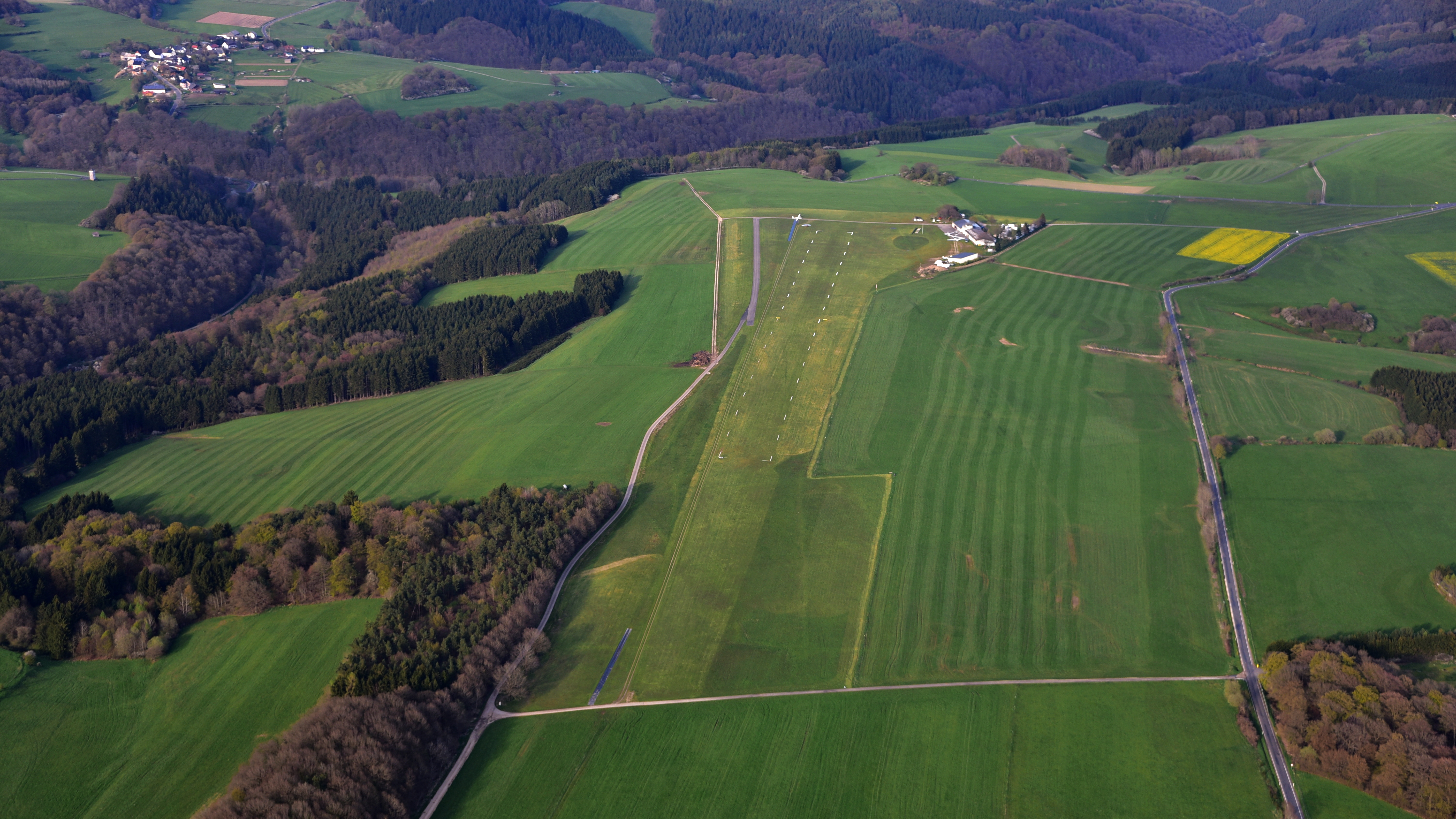 Flugplatz Wershofen, Luftaufnahme (2016)